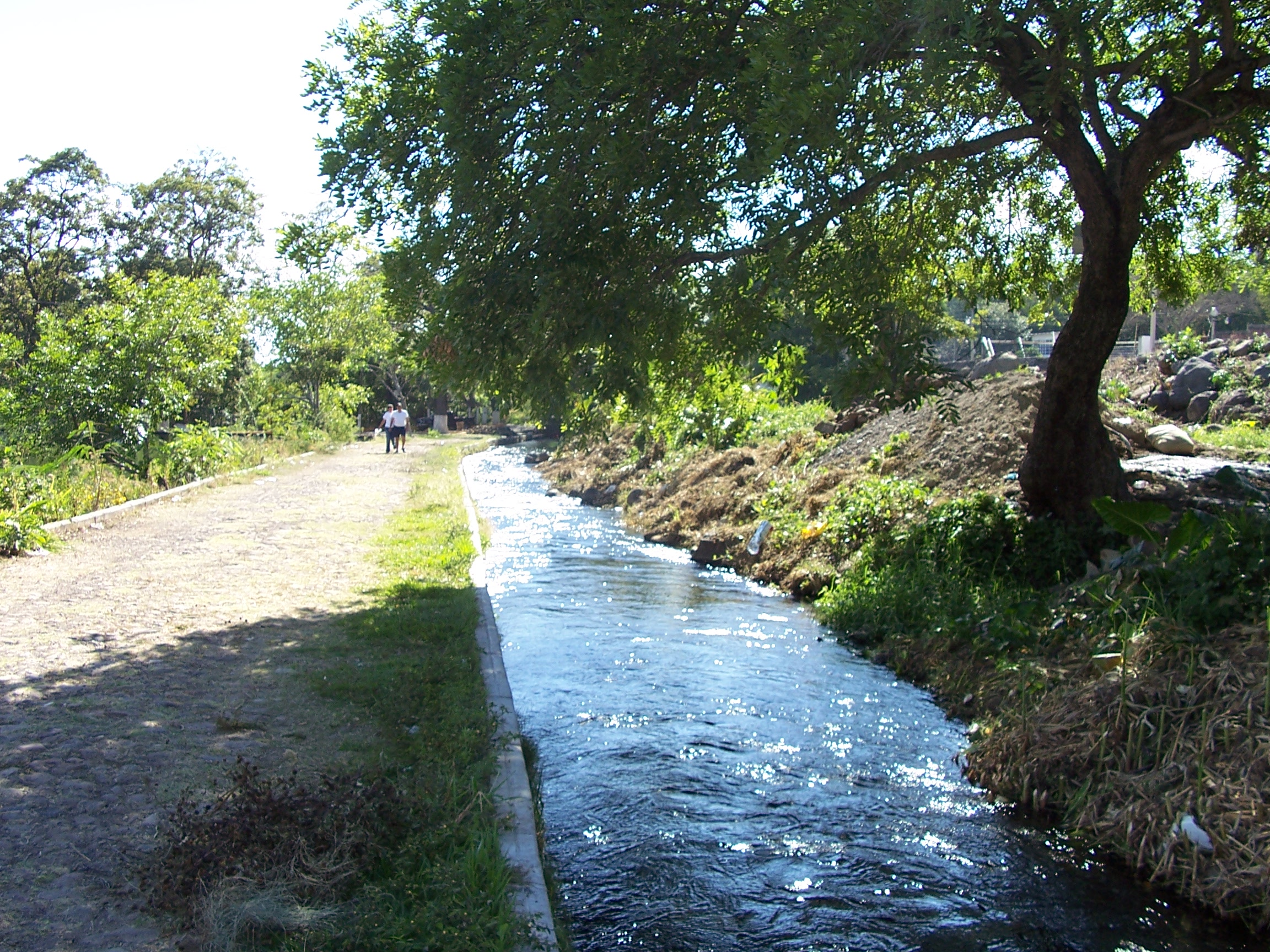 Acequia con agua cristalina, proveniente de los manantiales de Parácuaro — Michoacán.